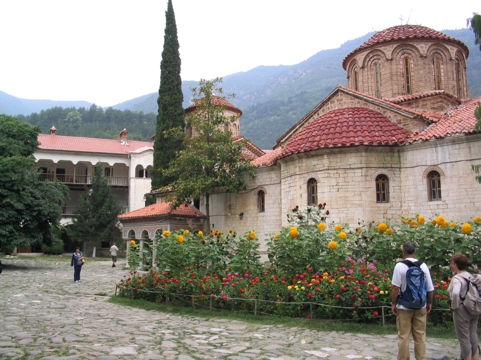 Monastère de Batchkovo «БАЧКОВСКИ манастир». Le deuxième plus grand monastère de Bulgarie. Eglise de l'Assomption de Notre-Dame.